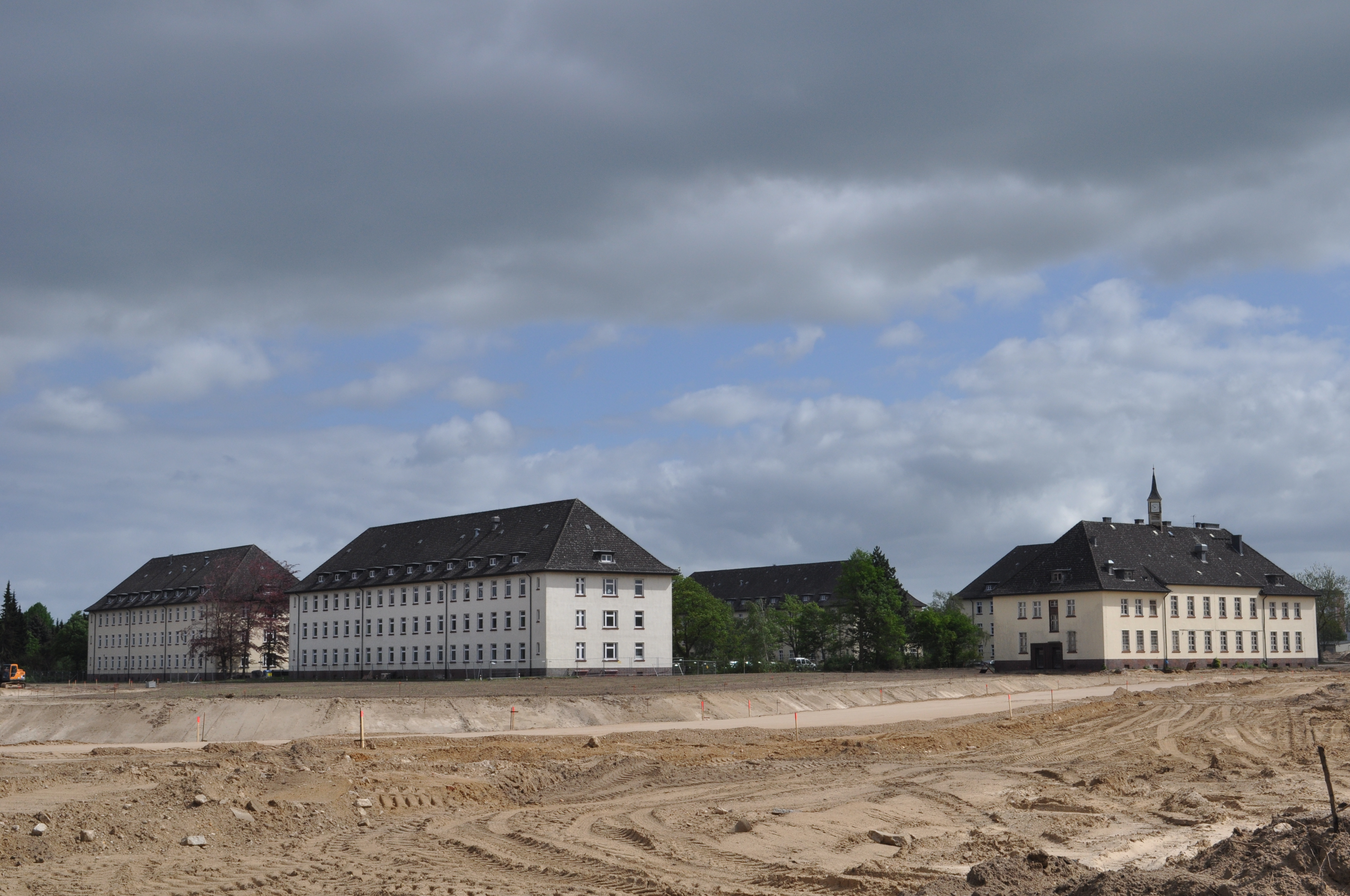 Blick von der Jenfelder Allee auf die Gebäude der ehemaligen Lettow-Vorbeck-Kaserne in Hamburg-Jenfeld